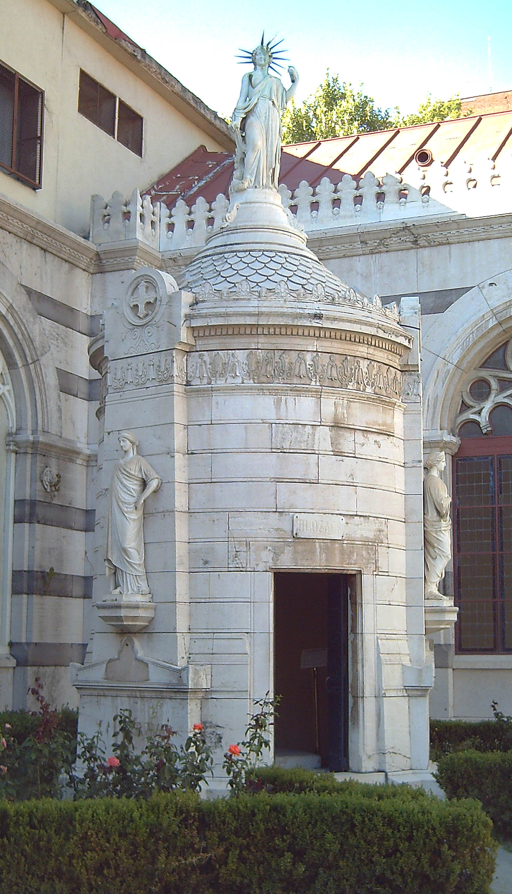 Vista del Monumento a la Libertad del Panteón de Hombres Ilustres de Madrid (España).